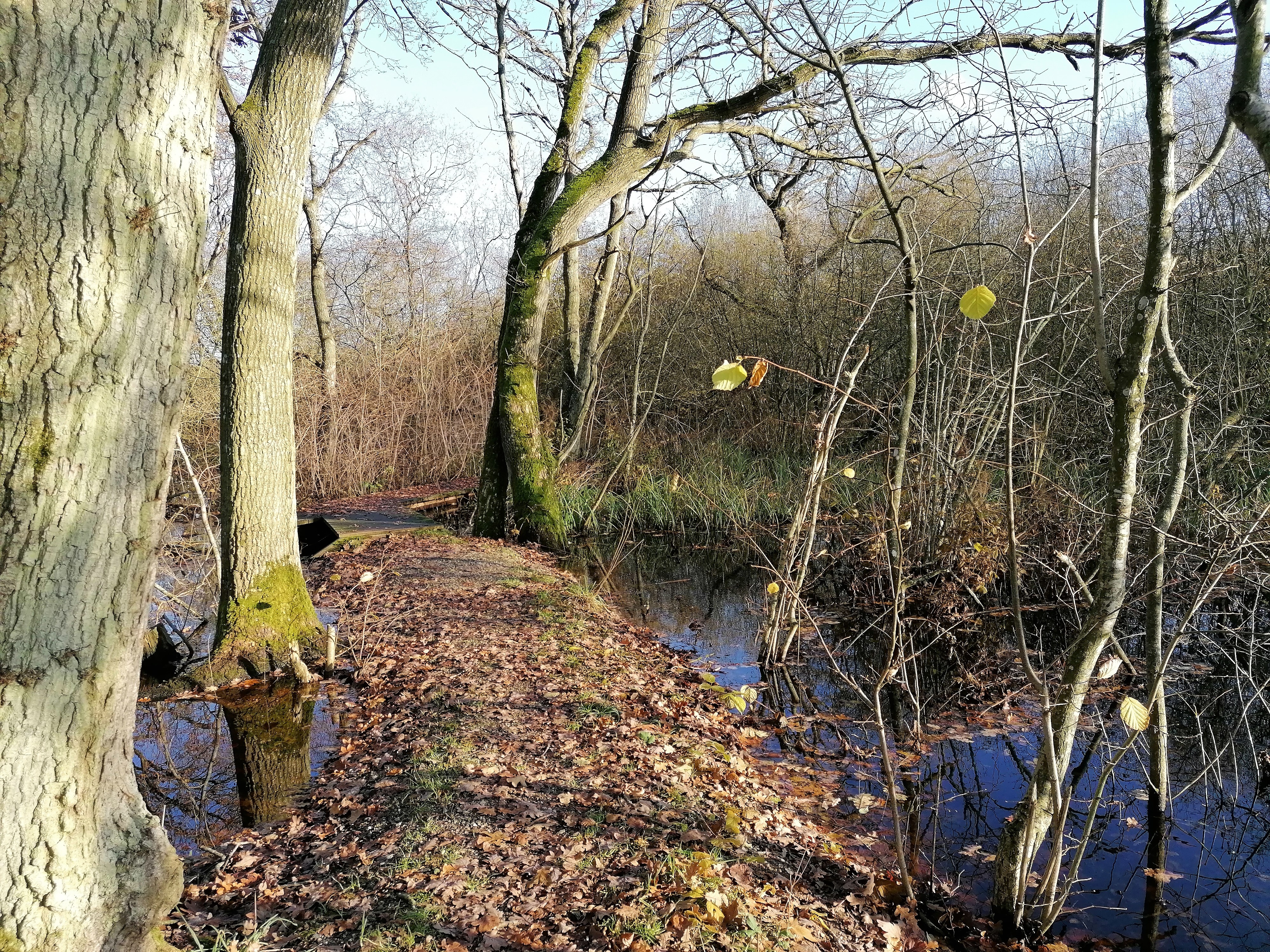 Tåstrup Mose ved nordvestenden af Tåstrup Sø